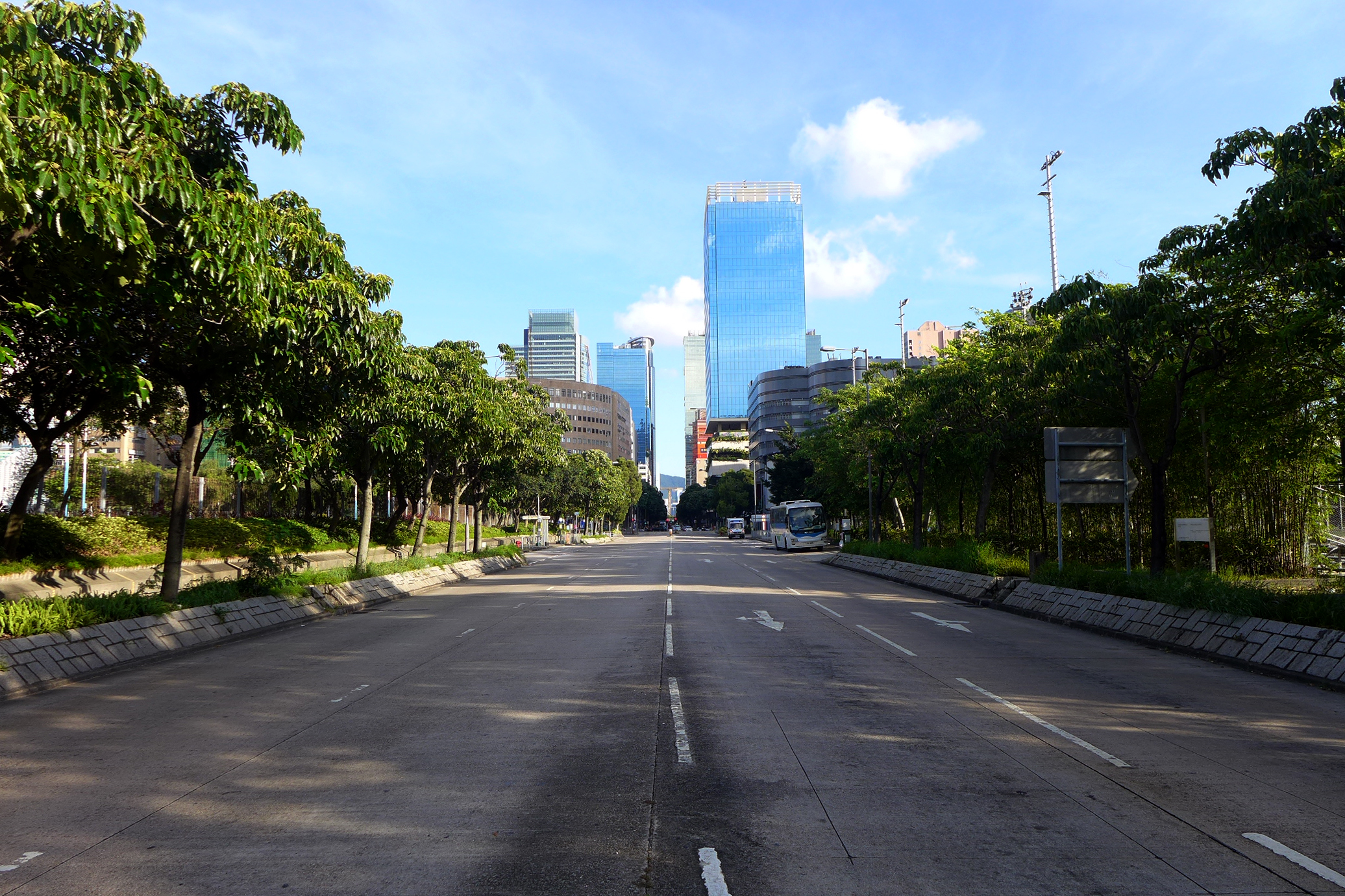 Wang Chiu Road